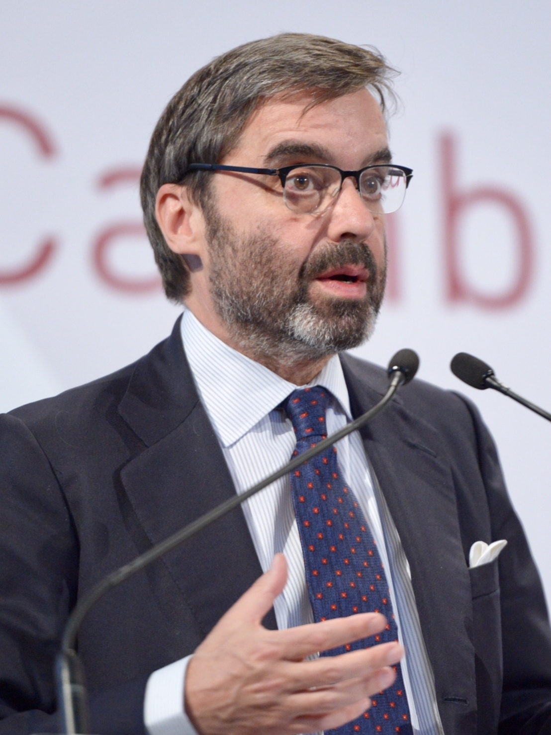 Dinar Cambra amb l’ambaixador representant permanent d’Espanya davant la UE, Pablo García-Berdoy